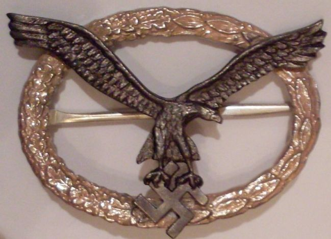 Fliegerschaftsabzeichen